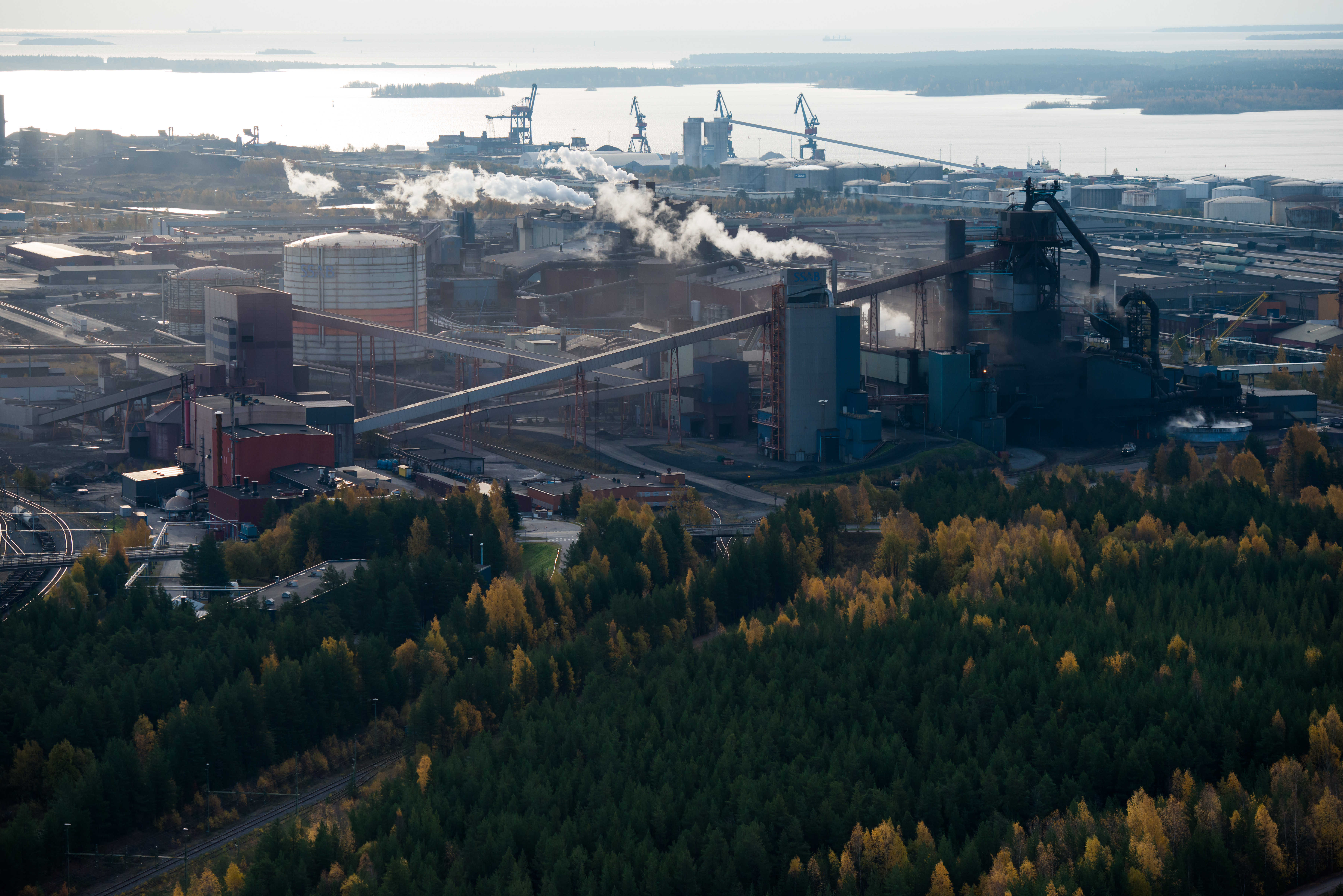 SSABs industriområde.